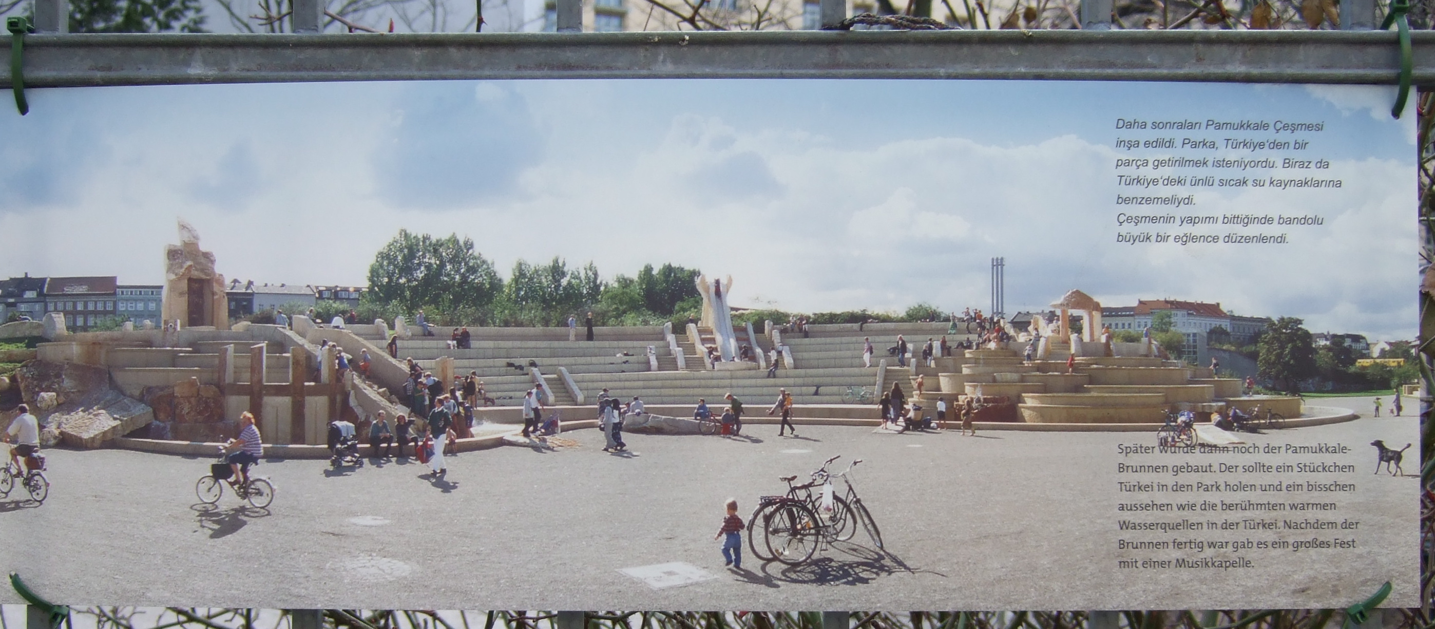 Infotafel zum Pamukkalebrunnen in der Taborstraße Berlin-Kreuzberg